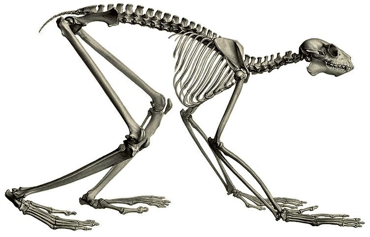 Indri skeleton